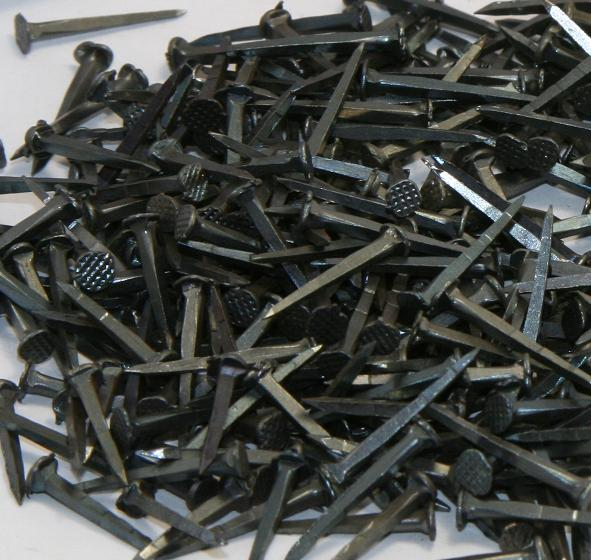 Semences de cordonnerie en acier bleui. Fabriquées dans l'usine Rivierre (France).